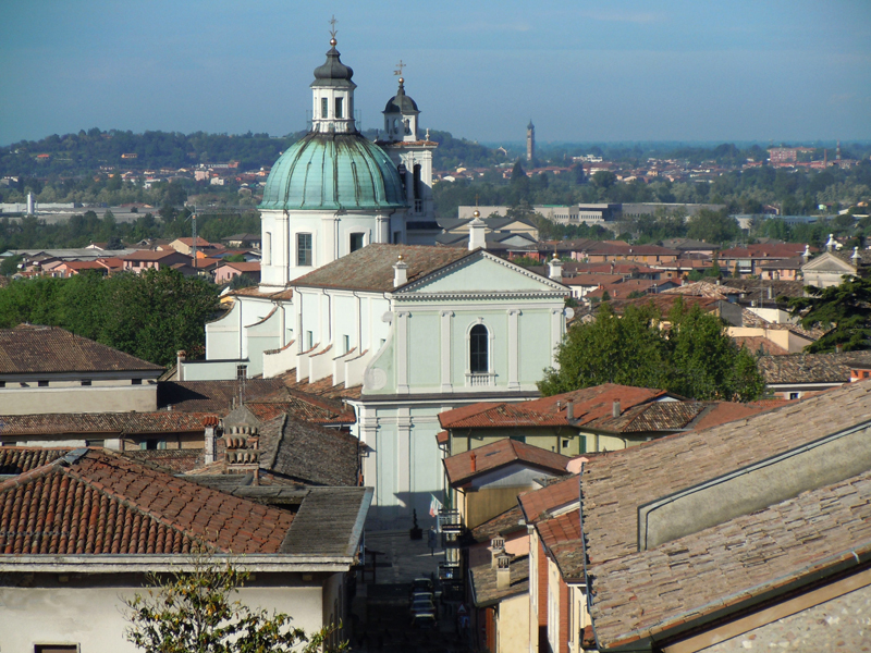 Castiglione delle Stiviere, Basilica di San Luigi vista dal castello.